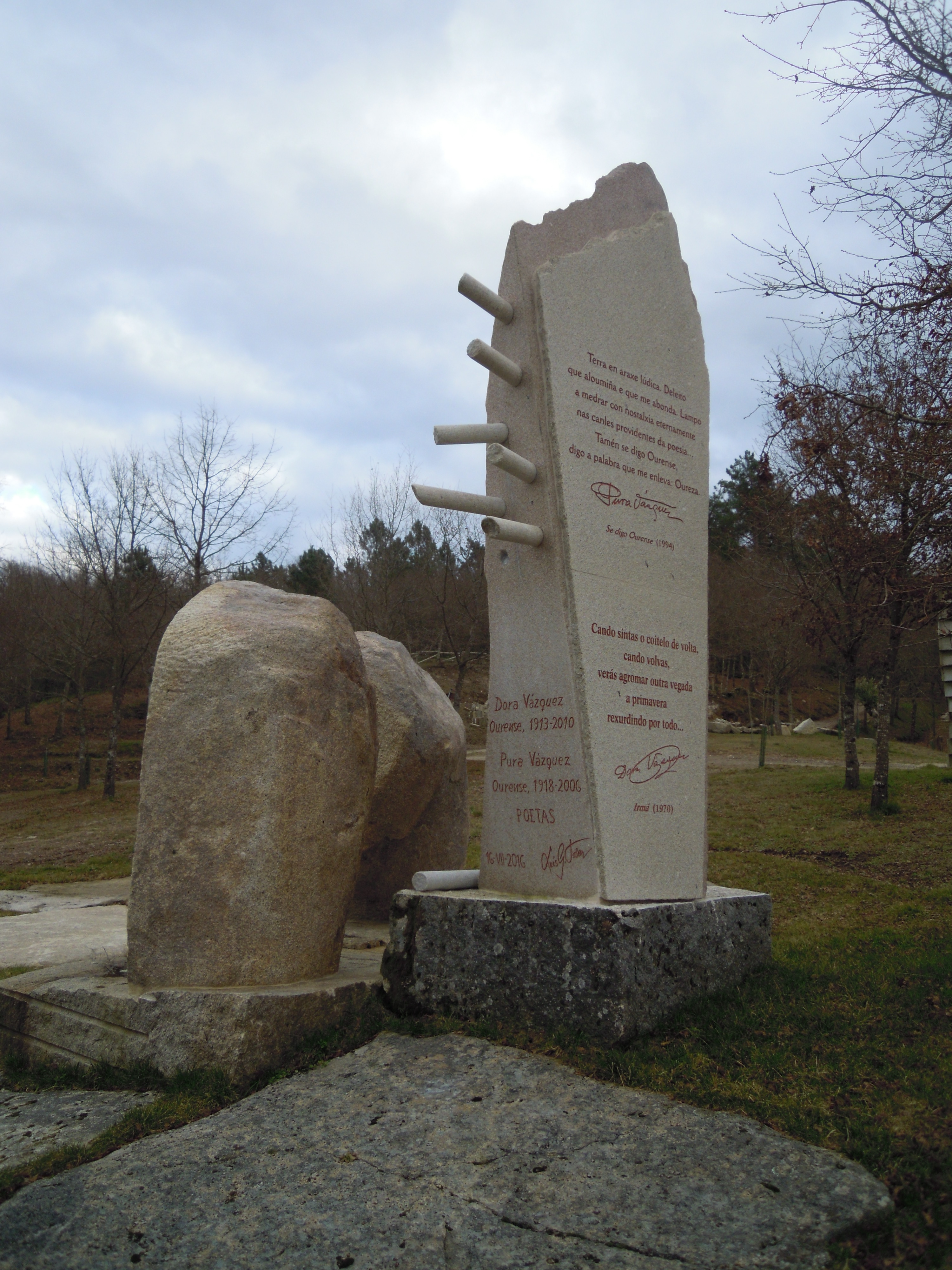 Escultura en homenaxe a Pura e Dora Vázquez na Insua dos Poetas